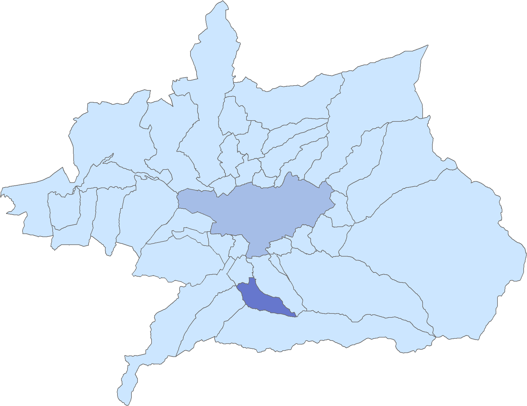 Situación del municipio de Gójar respecto a la comarca de la Vega de Granada, en España.